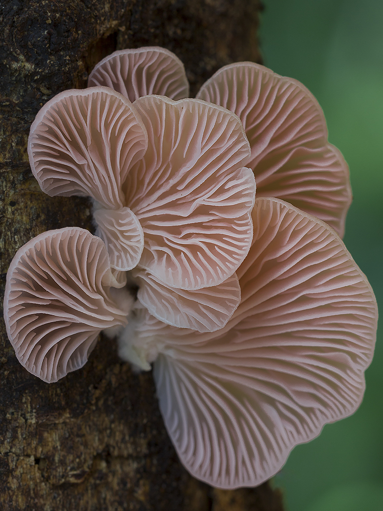 Local: Araçatuba/SP - Brasil Parque da Fazenda do Estado Bioma: Mata Atlântica Acessórios: Tripé + Trilho Foco Macro + Cabo Disparador Remoto